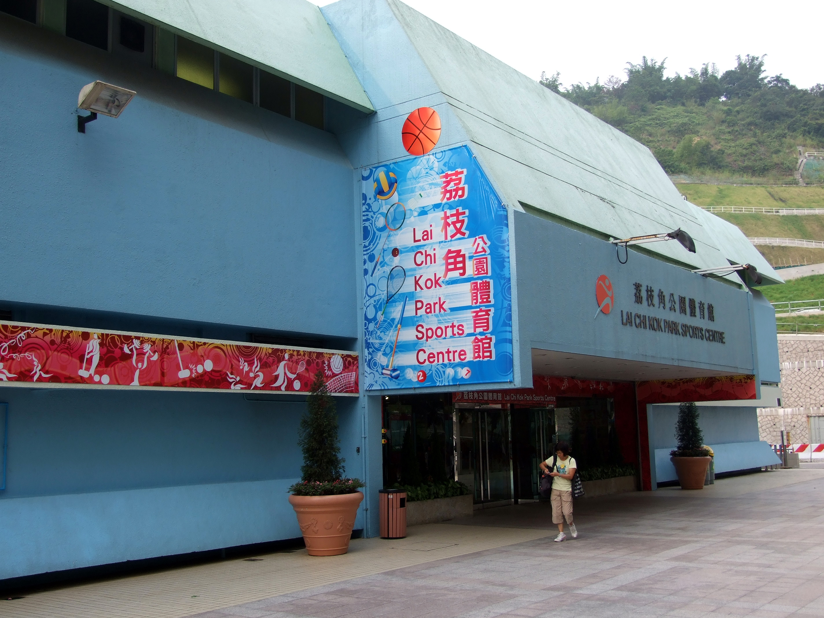 中文（香港）: 荔枝角公園體育館